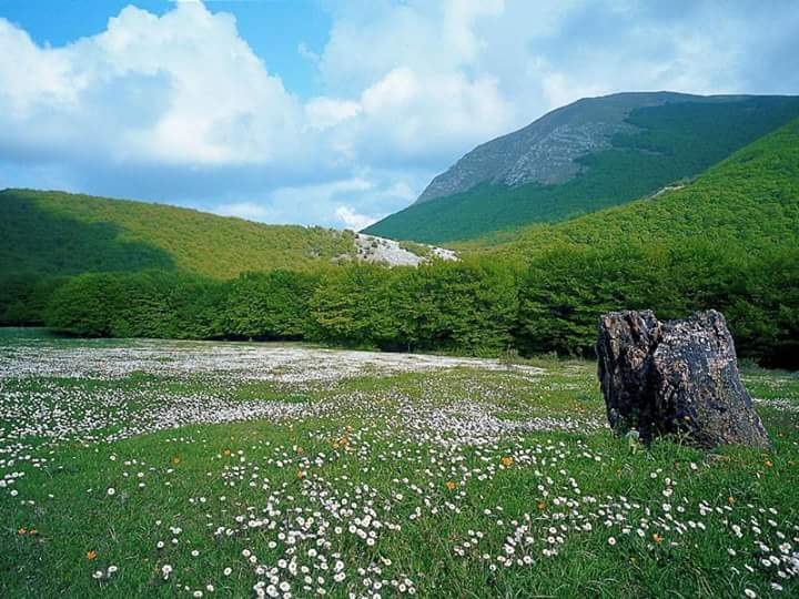 Pian delle Macinare, Parco di Monte Cucco